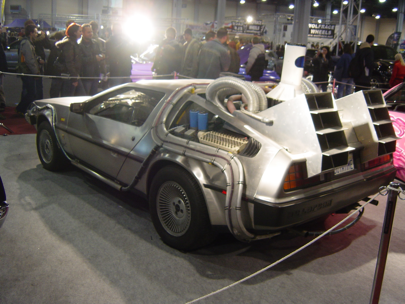 Delorean